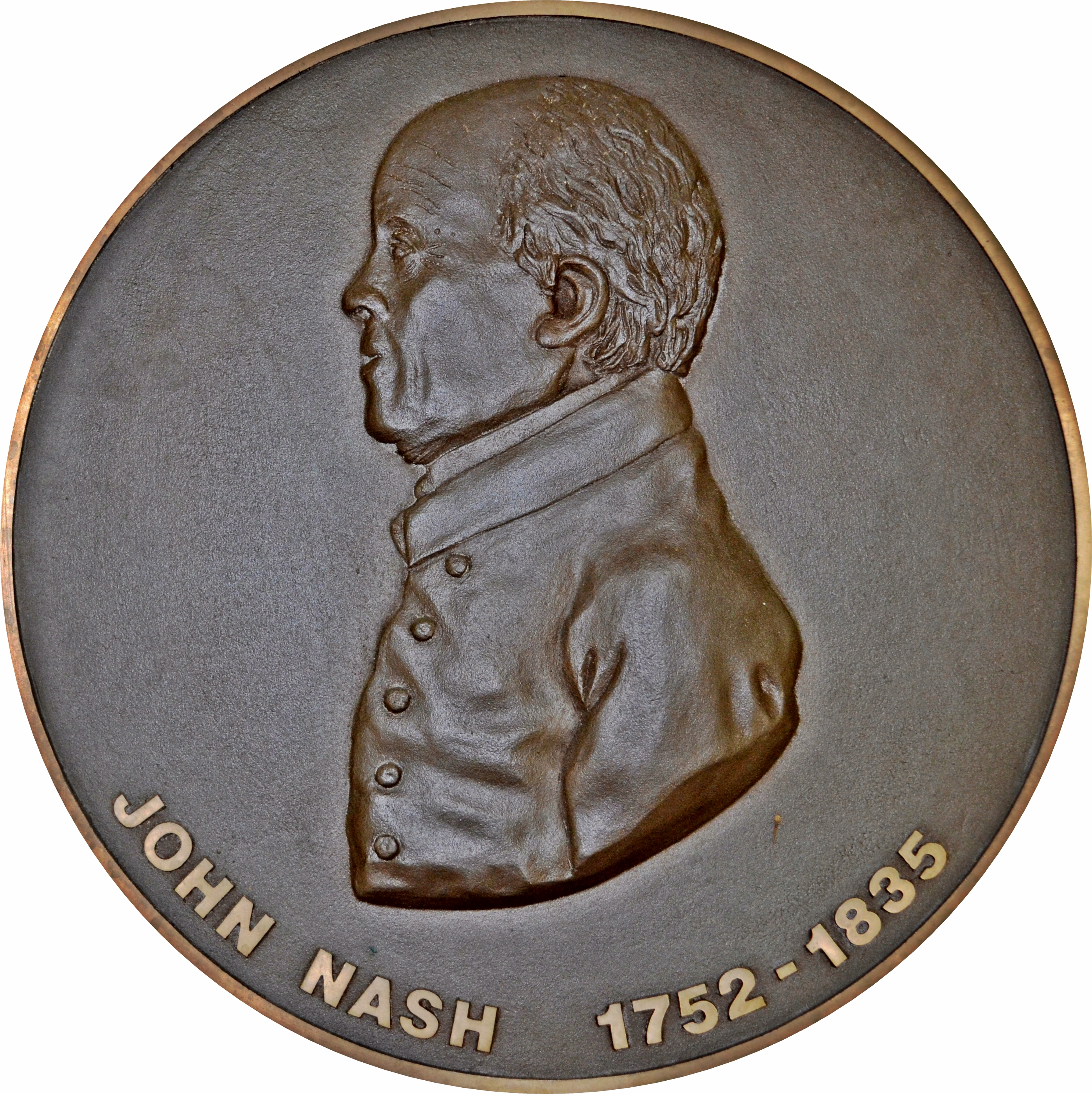 Médaillon représentant l'architecte anglais John Nash (1752 - 1835), apposé dans une construction appelée la Nash Summer House ; photographié dans les jardins de St-James's Square, Londres.